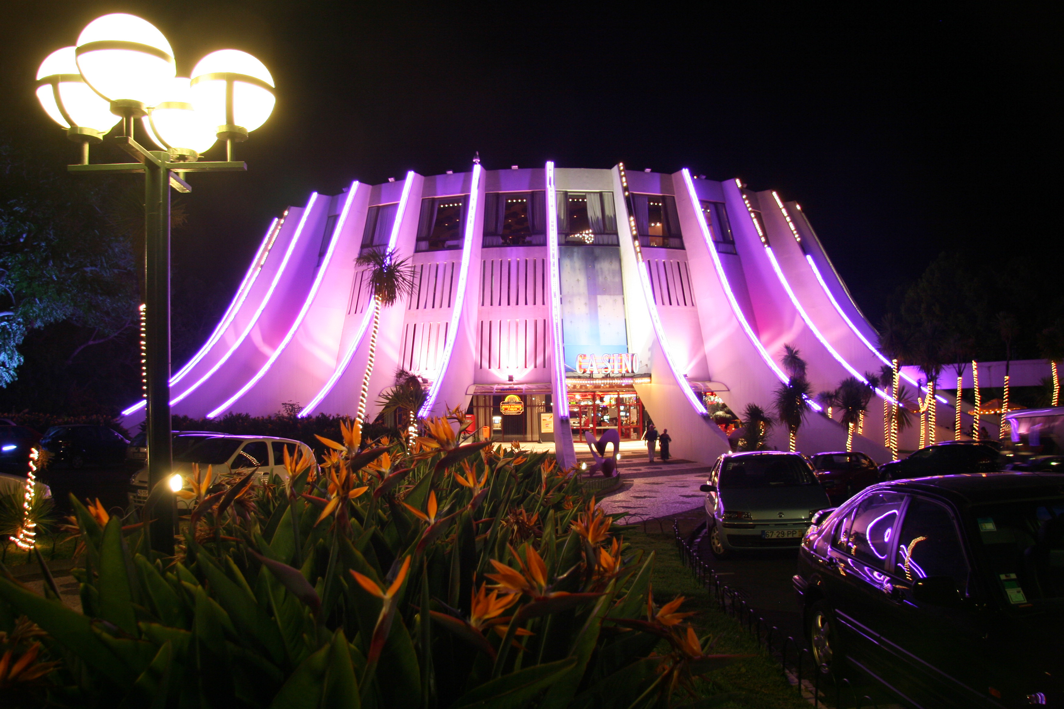 Das Casino in Funchal bei Nacht